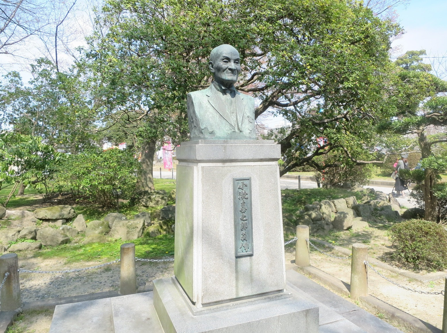 小瀧喜七郎（元岡崎市長）の銅像